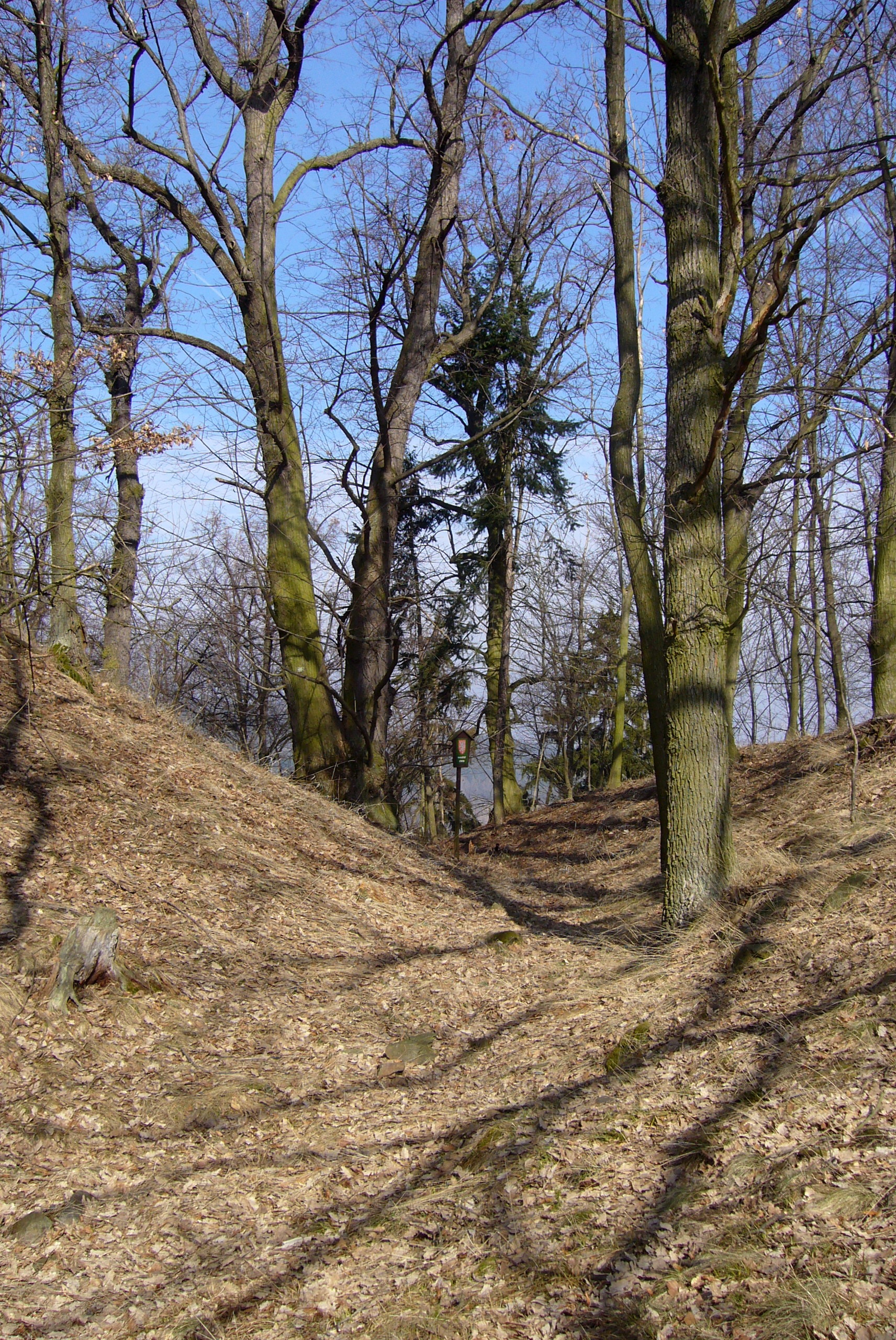 Příkop mezi předhradím a hradním jádrem, Hrad Oráčov, jihozápadně od vsi, Oráčov.